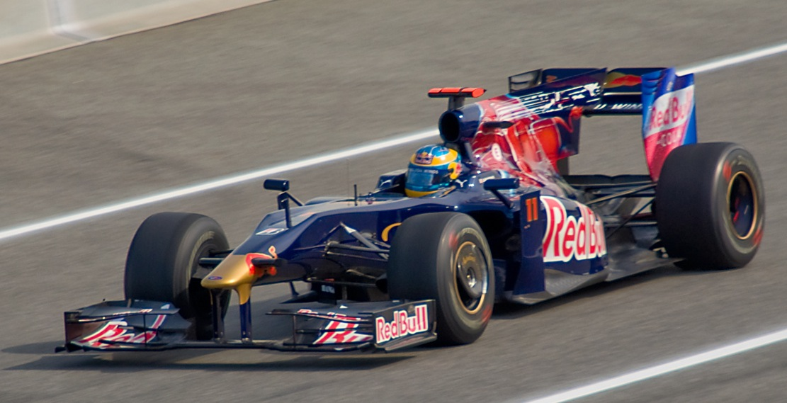 Nikon D90 + Sigma 18-200 DC OS HSM 1/500s - F/6.3 - 200mm - ISO200